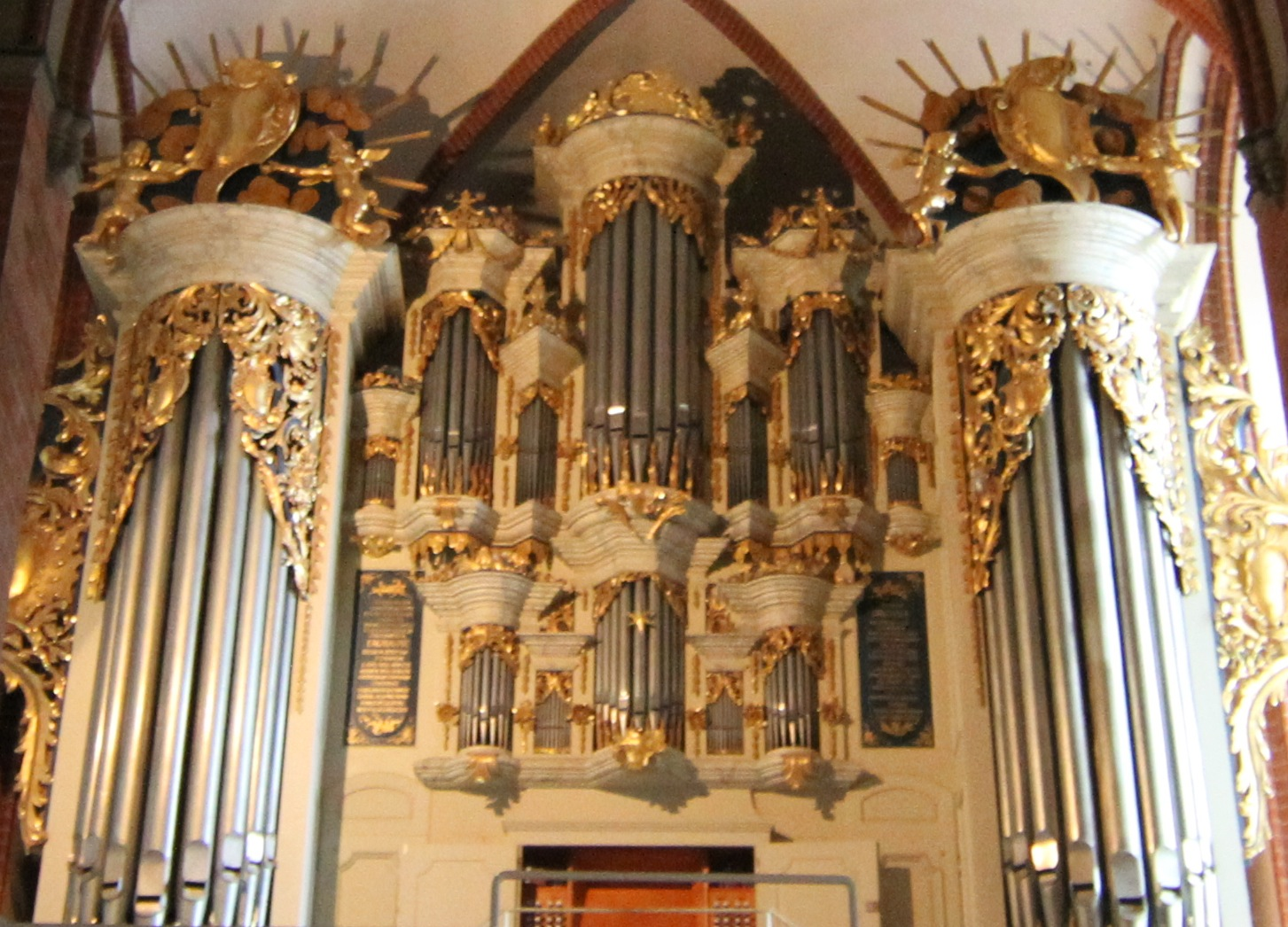 Orgel in der Uelzener Stadtkirche St. Marien.